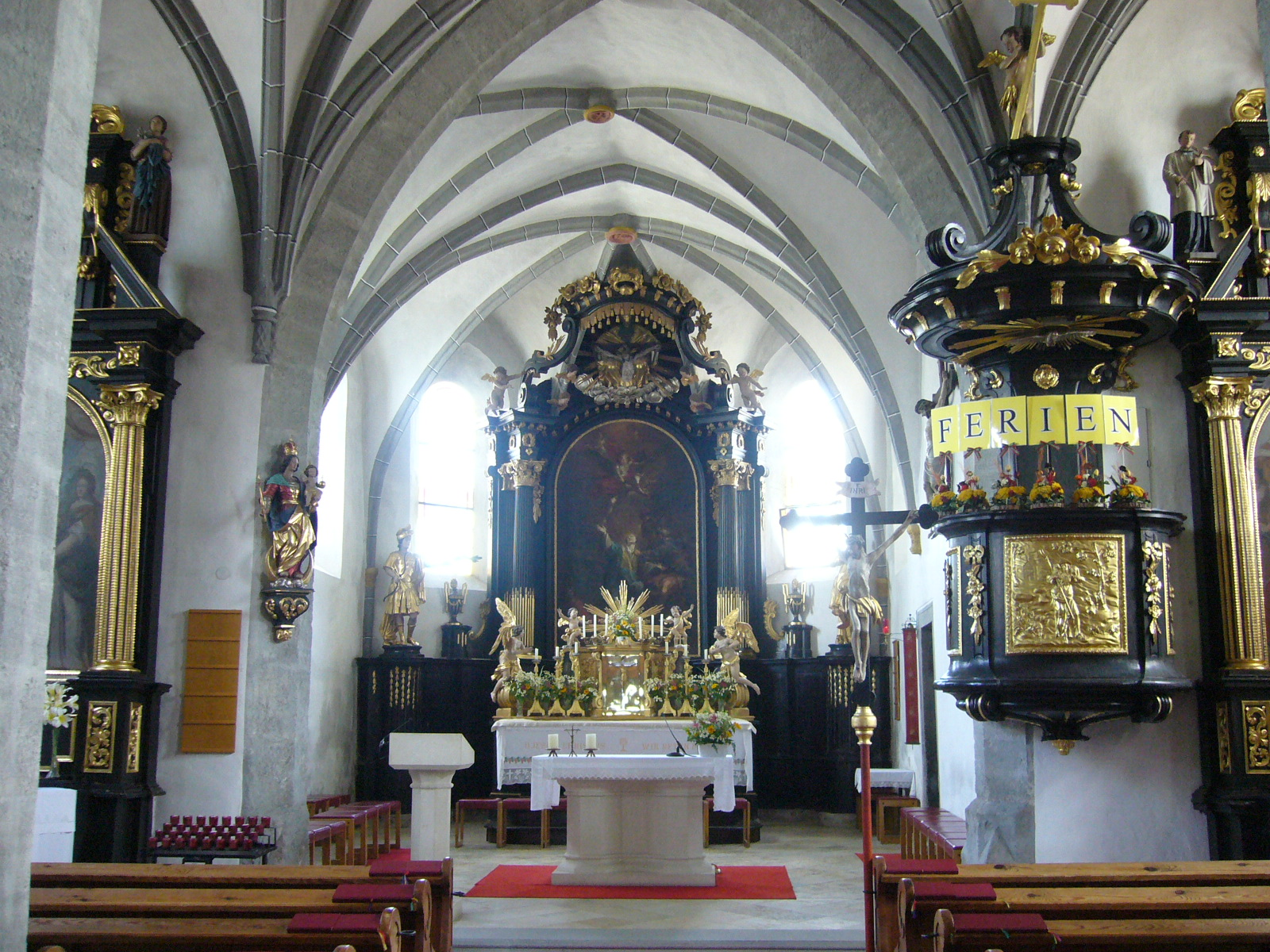 Inneres der Kirche in Biberbach, Niederösterreich